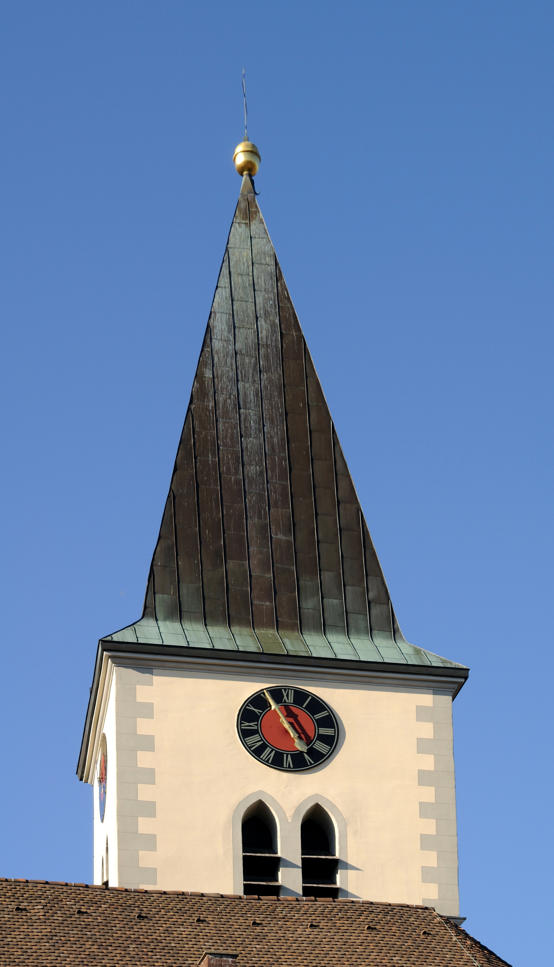 Rheinfelden-Herten: St. Urban, Glockenturm